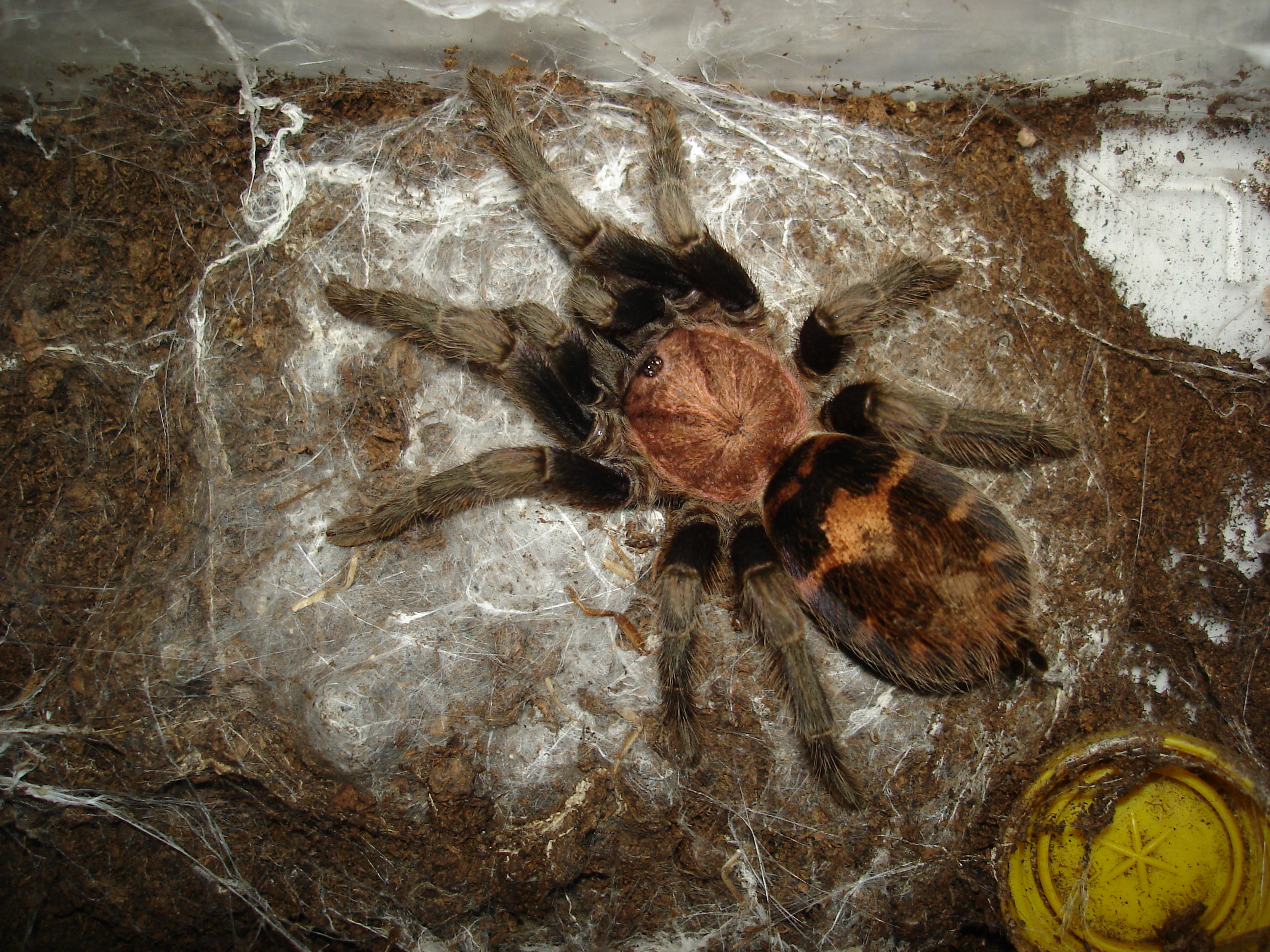 Davus fasciatus, adult female